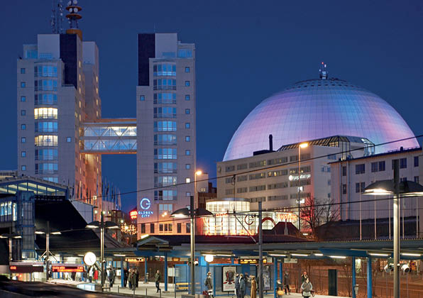 Bild på fastigheter som Klövern äger i Globenområdet